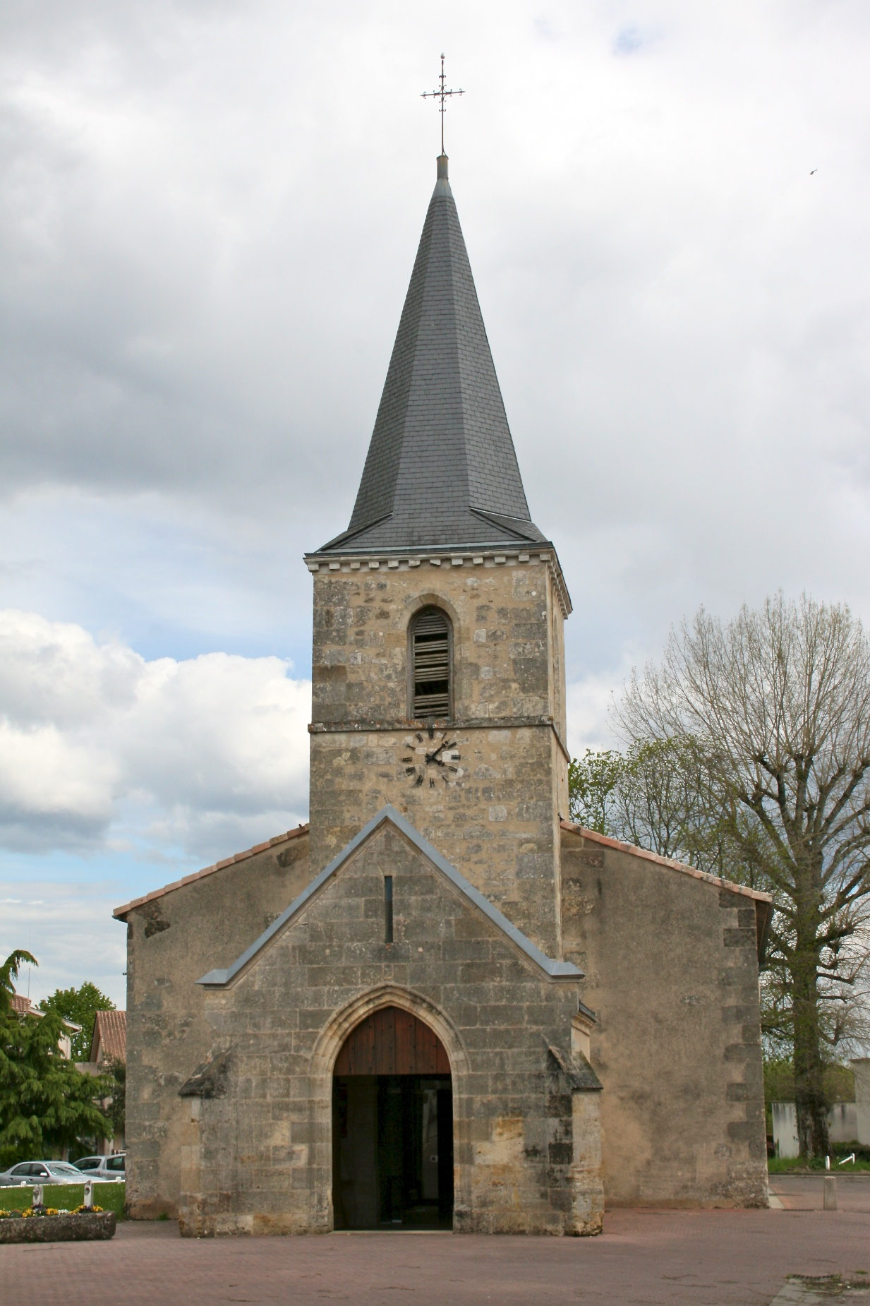 Eglise Saint-Jean-Baptiste de Canéjan (2012)